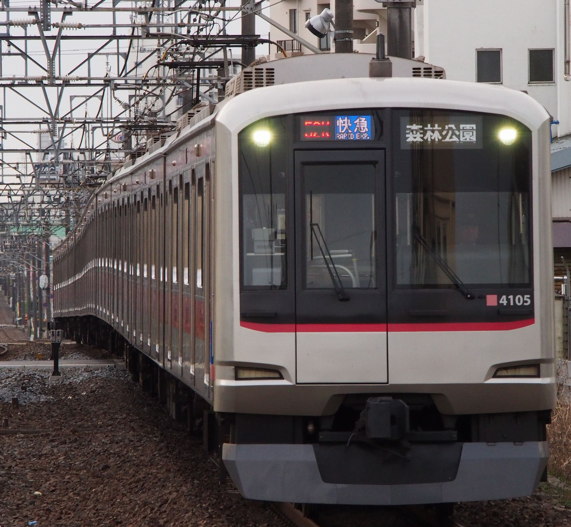 2016年3月26日実施のダイヤ改正で、新たに登場した地下鉄線直通の快速急行。西武池袋線とは違い、青地に白抜き文字で表現される。（鶴瀬）